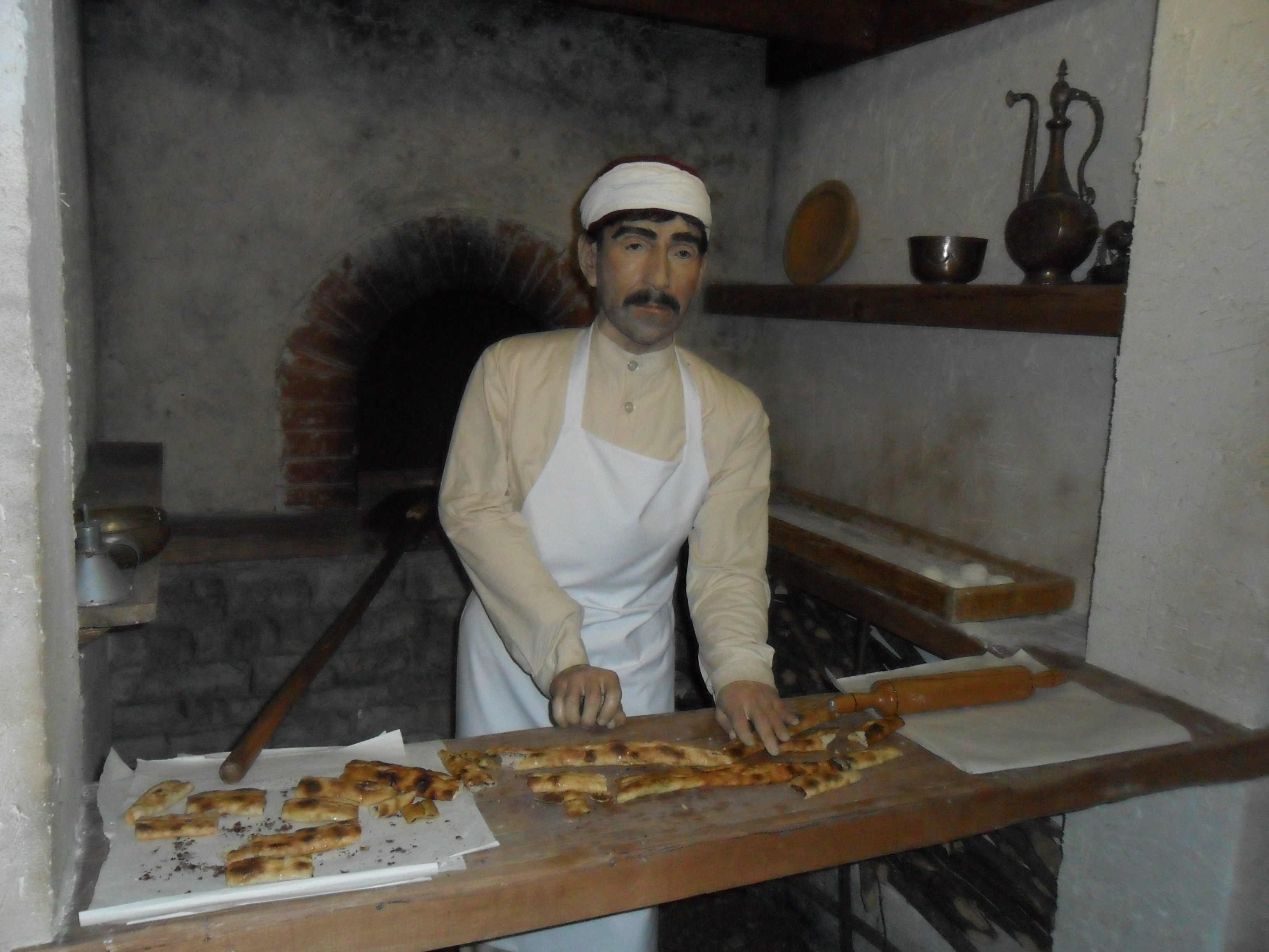 Samsun Kent Müzesi'nde yer alan Samsun pidesi yapan pide ustası.